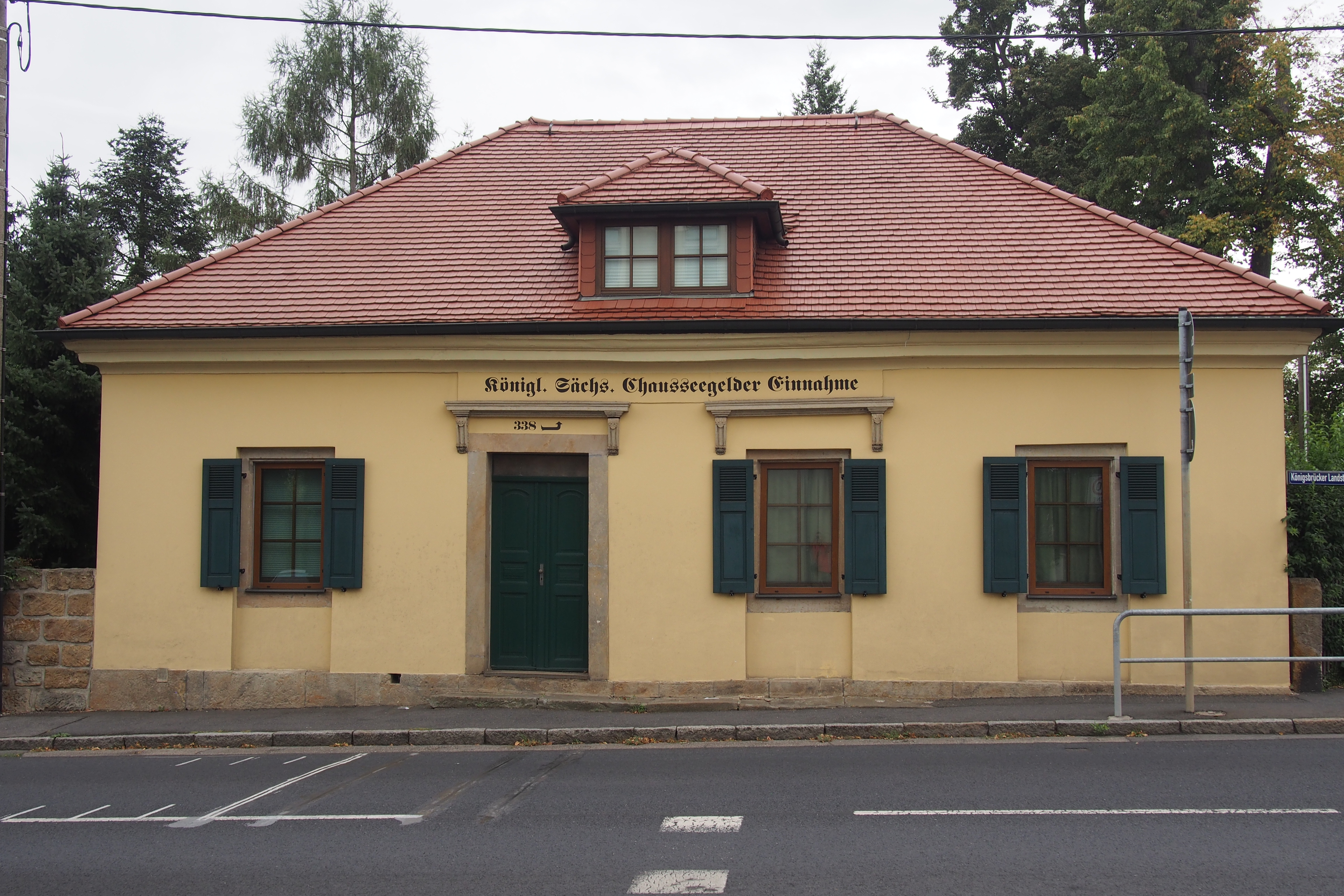 Denkmalgeschütztes Chausseehaus (Zollhaus) auf der Königsbrücker Landstraße 338 im Dresdner Ortsteil Lausa